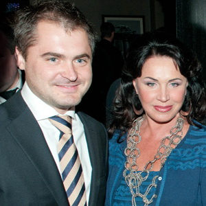 Надежа Бабкина и Евгений Гор на 5-летии программы "Пусть говорят" 10 сентября 2010 года